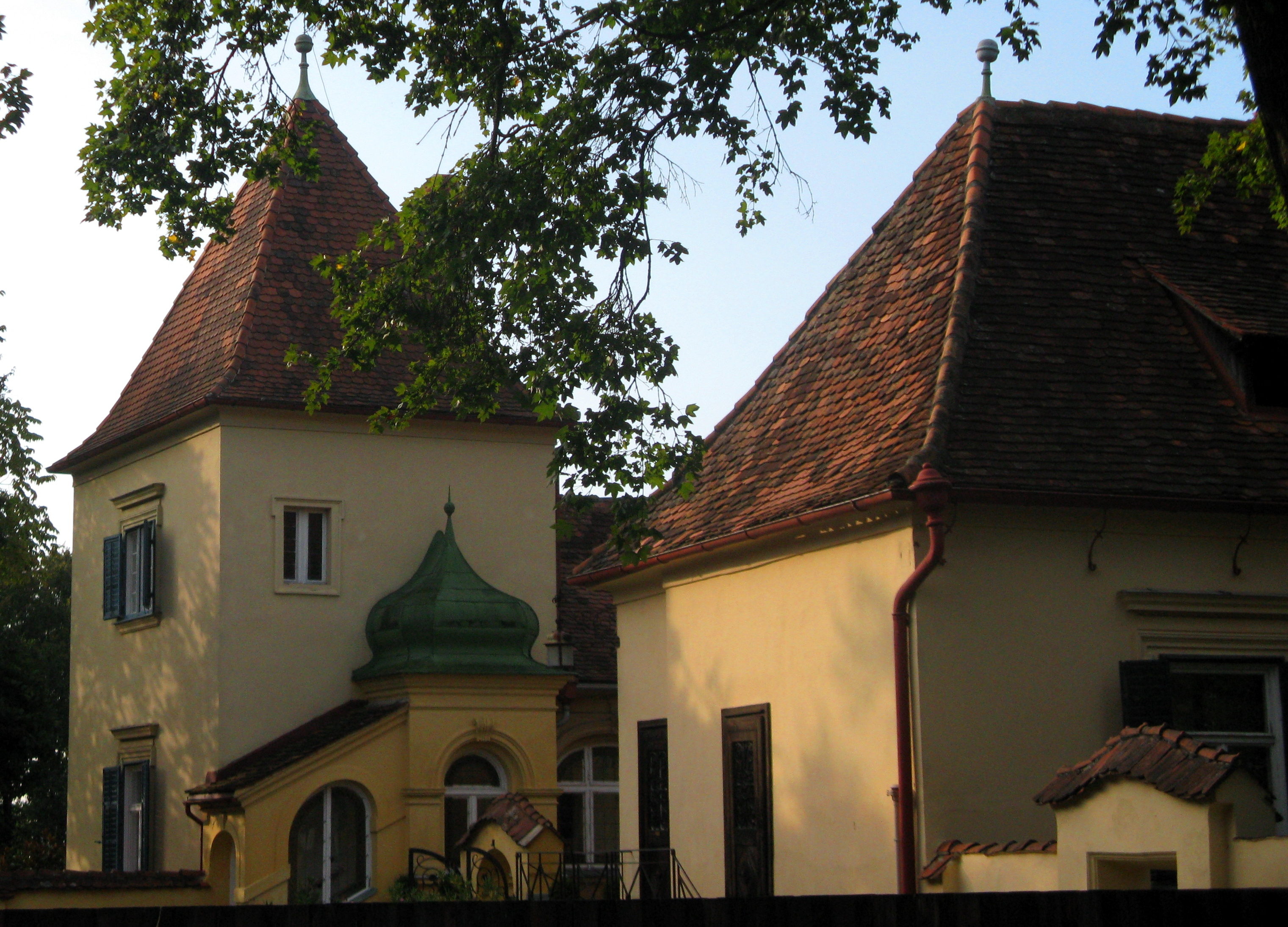 Hallerschloss mit Wirtschaftsgebäude und Gartendenkmale